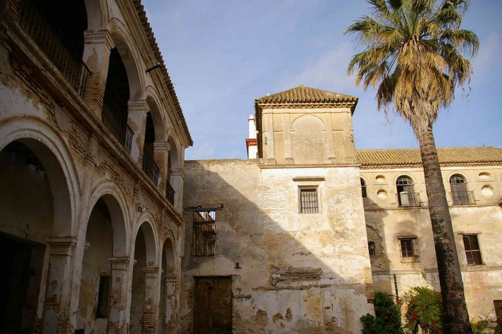 Jardín del apeadero de la Casa de Arizón en Sanlúcar de Barrameda